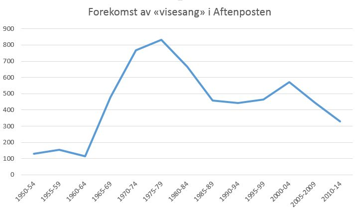 Forekomst av ord som inneholder «visesang» i Aftenposten.